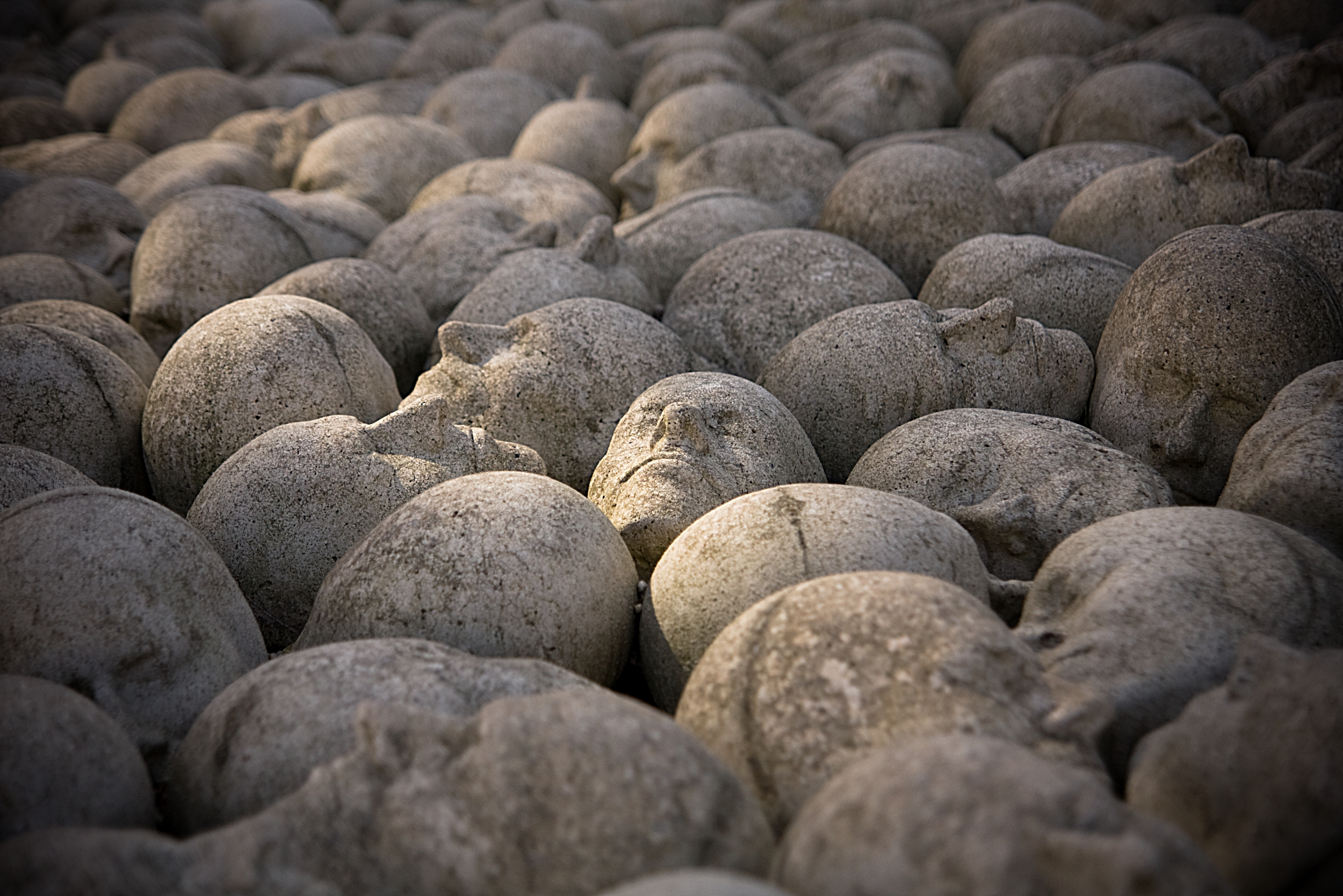 Timm Ulrichs: Kopf-Stein-Pflaster (nach dem Kopf des Künstlers, 1980/1994, Standort: Hannover, Straße Schiffgraben neben Finanzministerium